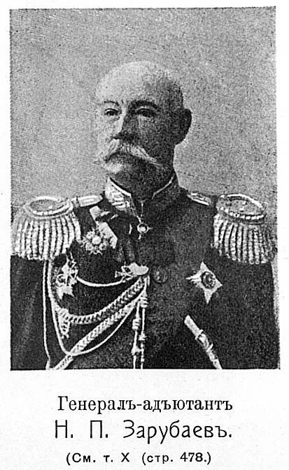 Это изображение было использовано для иллюстрирования статьи «Зарубаев, Николай Платонович» опубликованной в десятом томе «Военной энциклопедии», который был издан книгоиздательским товариществом И. Д. Сытина в 1912—1913 гг. в столице Российской империи городе Санкт-Петербурге.